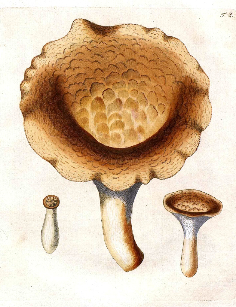 Rycina Polyporus tuberaster z "Collectaneorum supplementum" N. Jacquina (1797)